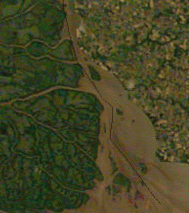 Imágen satelital del estuario del Río de la Plata, detalle de Isla Juncal